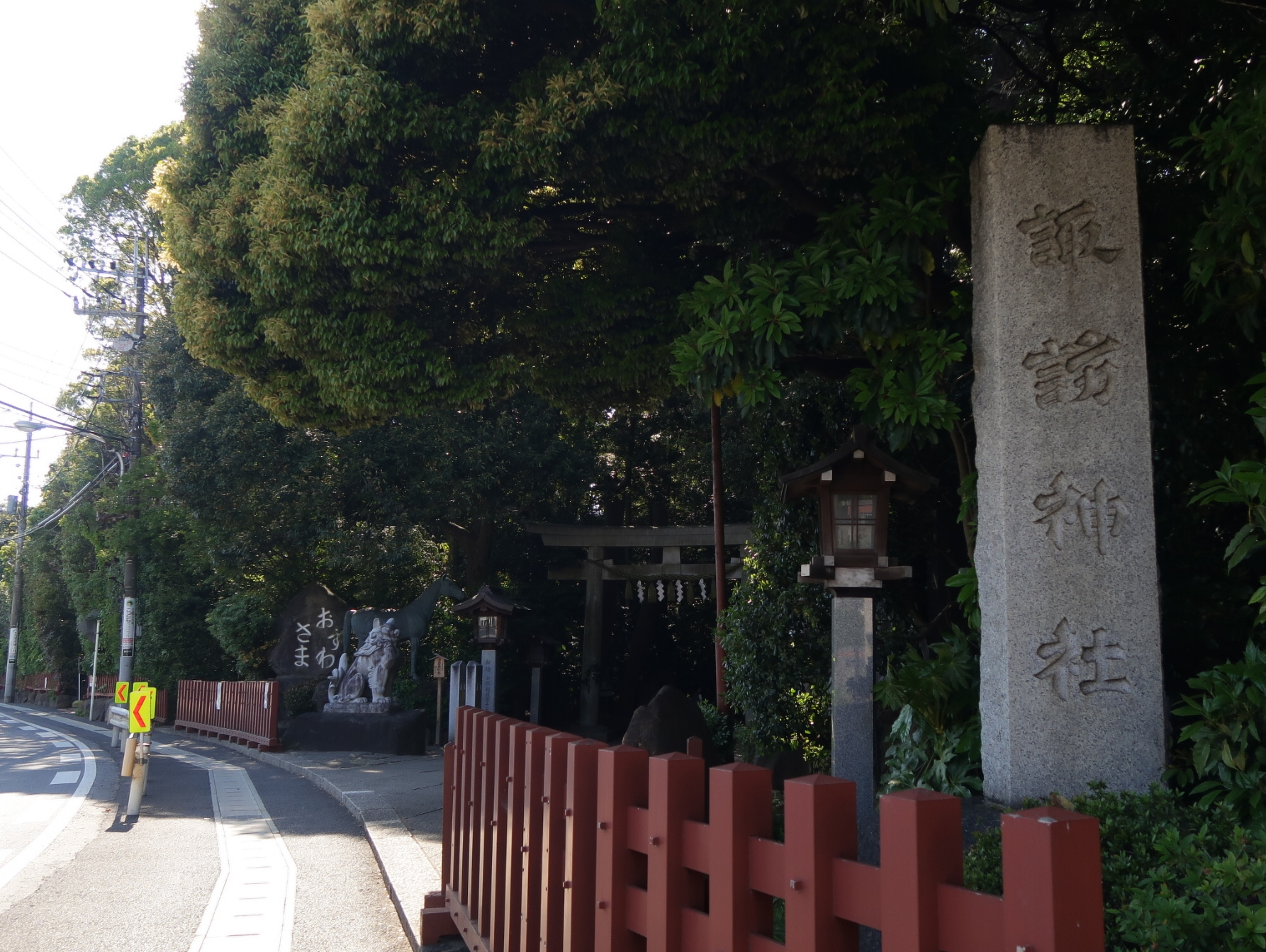 駒木諏訪神社（千葉県流山市駒木）